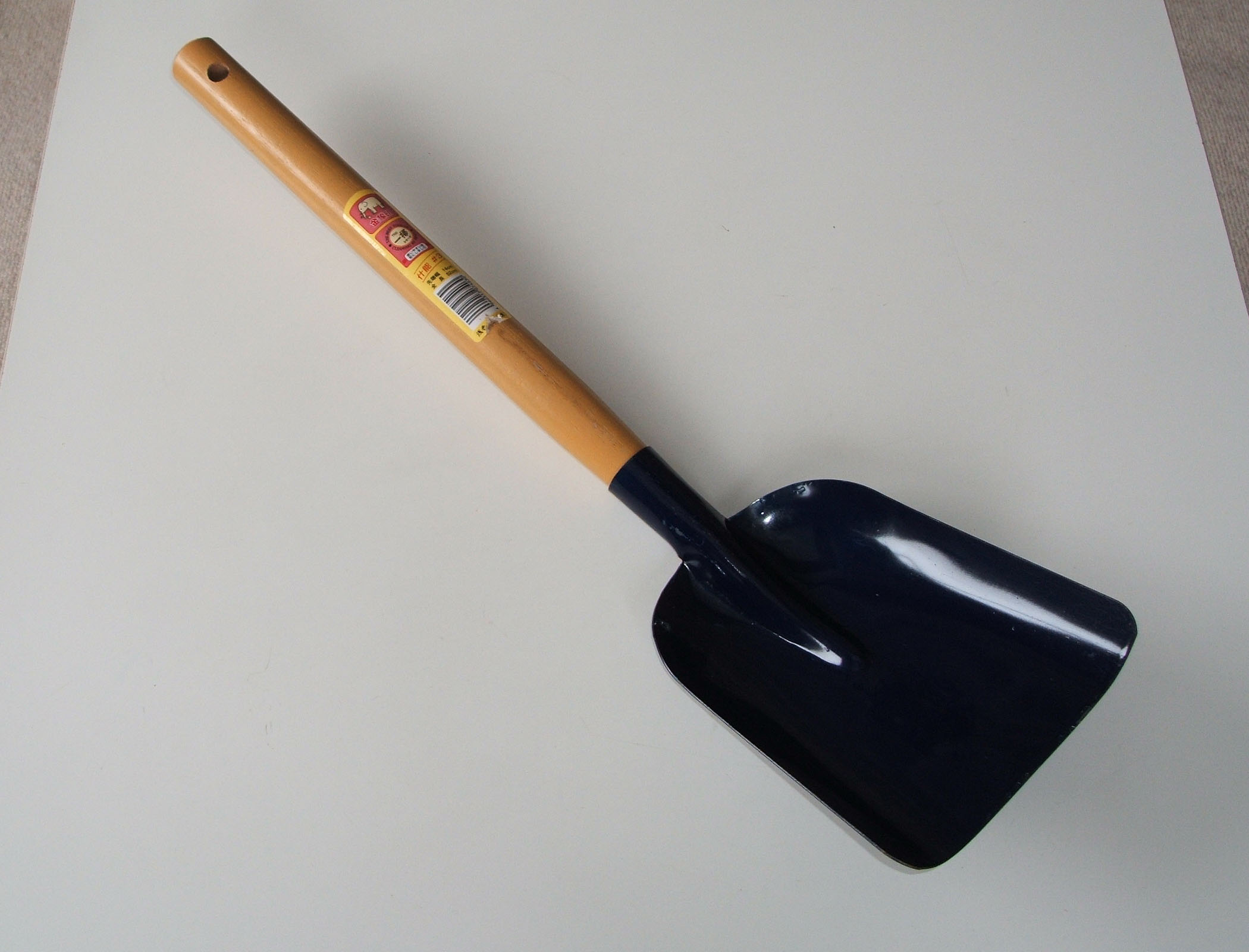 firepan "jyuunou" (asaka industrial), Japan